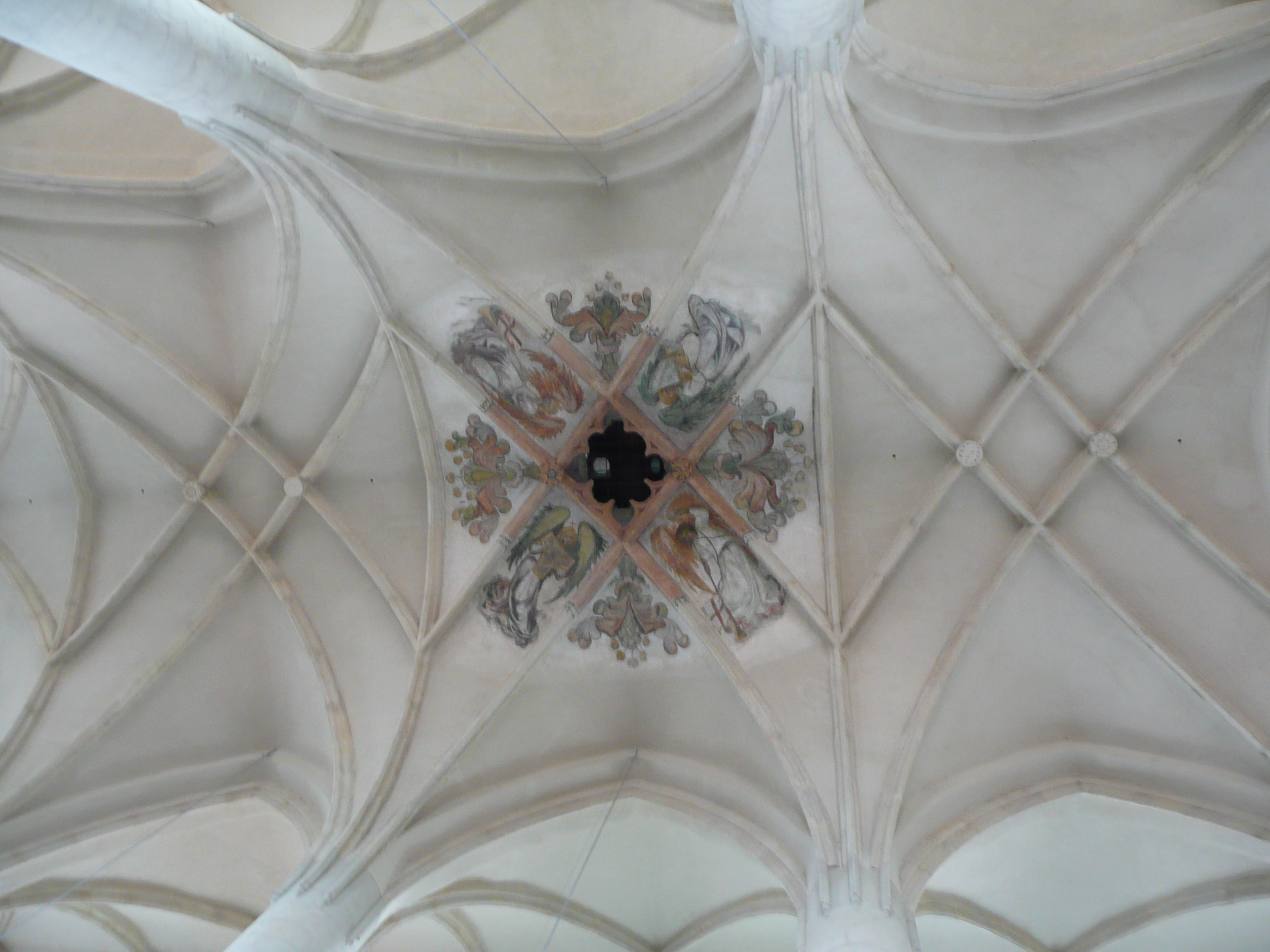 Kostel svatého Mikuláše (Znojmo), klenba trojlodí, detail dutého svorníku.